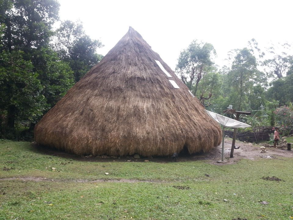 Fonte de Agua em Dato Rua,Fohorem